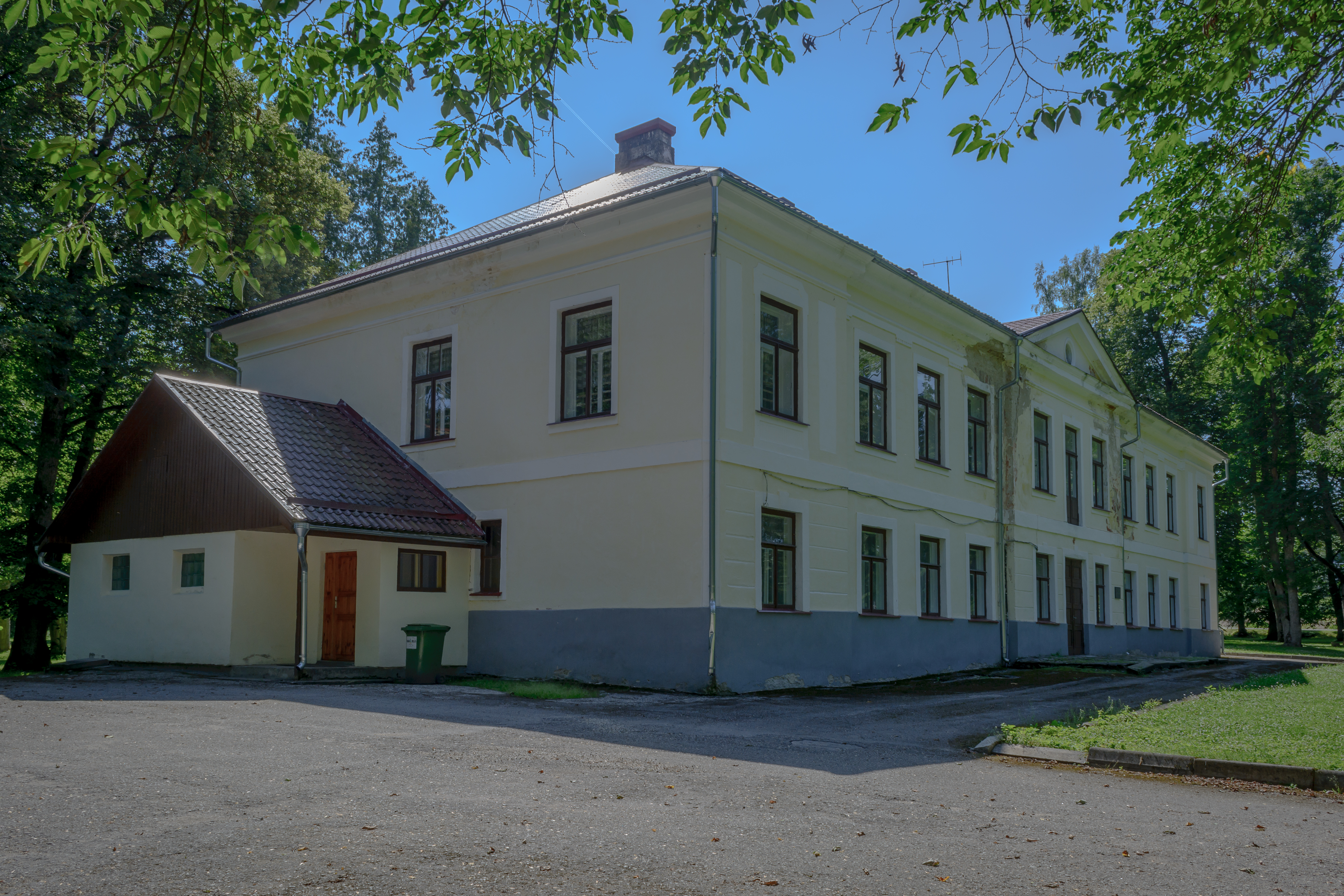 Salla mõisa härrastemaja